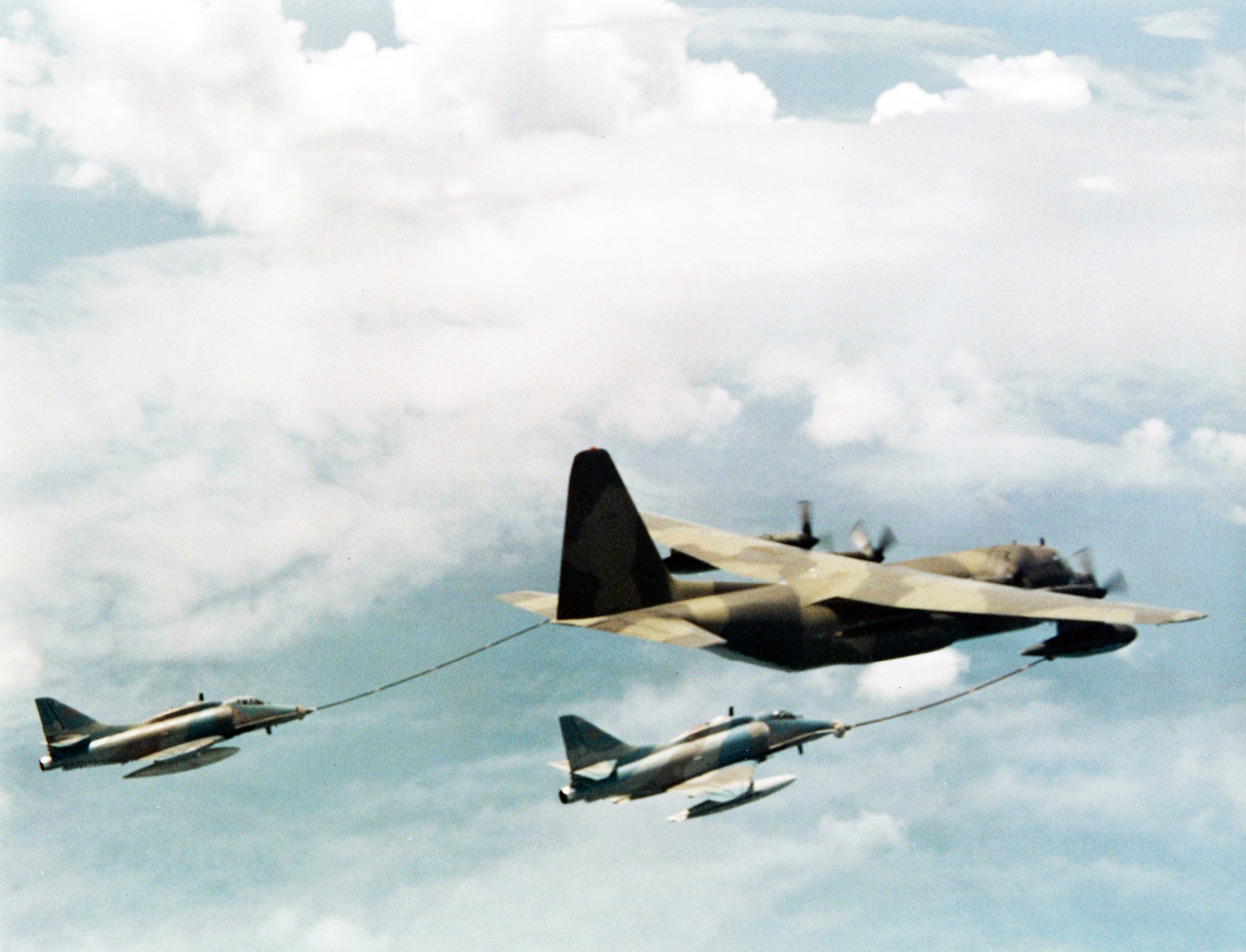 Dua A-4 Skyhawk TNI AU sedang melaksanakan pengisian bahan bakar di udara dari pesawat Tanker